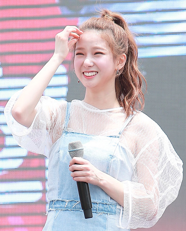 170617 CLC 유진 직찍 @ 광교호수공원